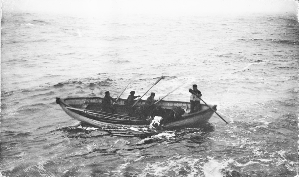 Экипаж поискового корабля «Миния» вытаскивает из воды в шлюпку тело погибшего в результате крушения «Титаника»